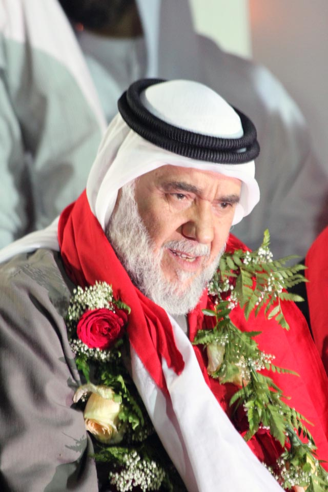 Hassan Mushaima en train de faire un discours pendant une manifestation pro-démocratique le 26 février 2011, à la Place de la Perle, à la capitale bahreïnie, Manama.